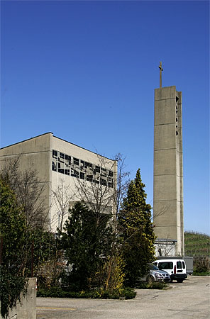 Boudry: l'église catholique